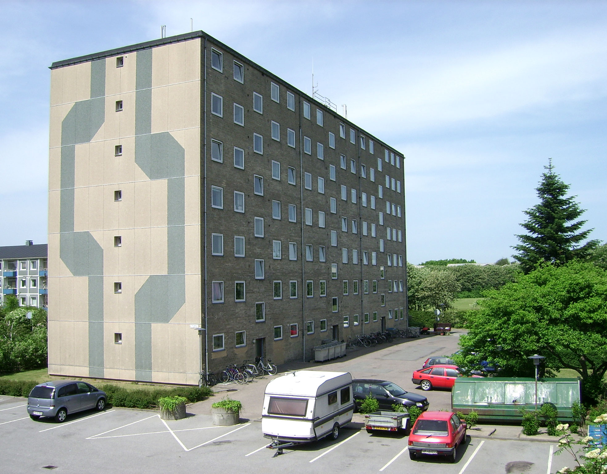 Illerupvej 38-40-42